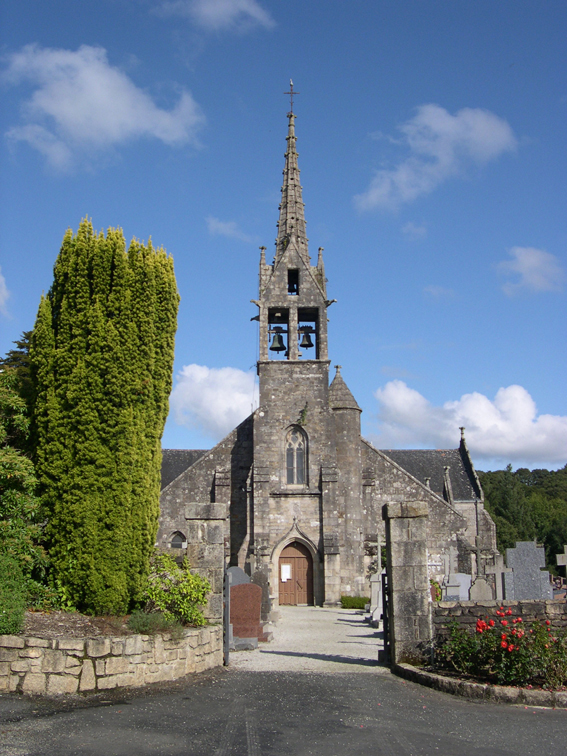 Iliz Sant-Hern Lokarn